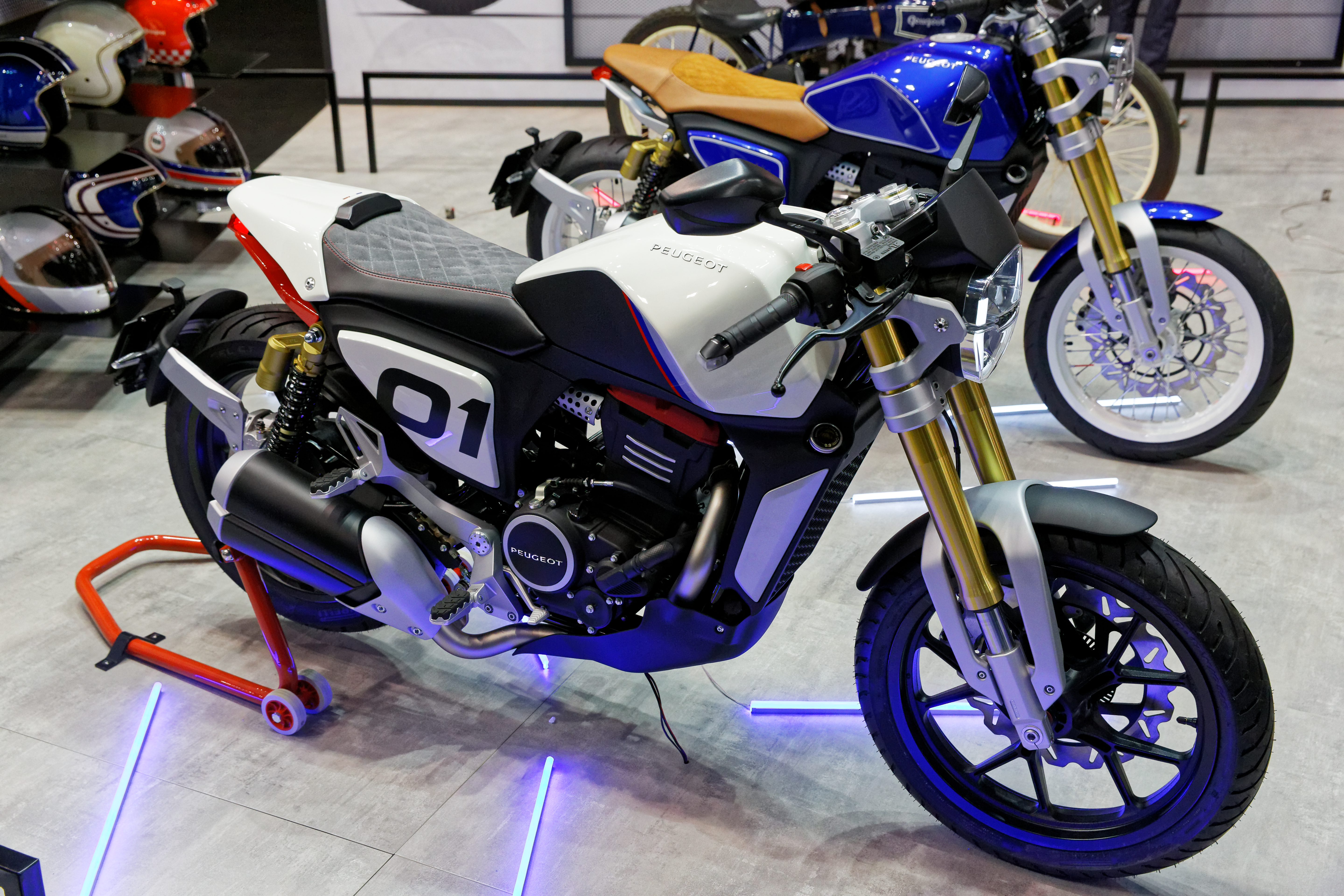 Une Peugeot Concept P2X Café Racer, moteur monocylindre à 2 ACT de 300 cm3, exposée lors du Mondial de l'automobile de Paris 2018.